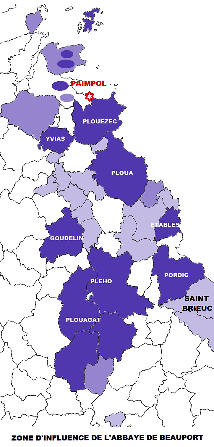 Paimpol, 22, Abbaye de Beauport, Zone d'influence